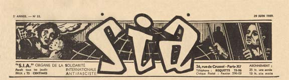 Journal Solidarité Internationale Antifasciste (SIA) n°33 du 29 juin 1939